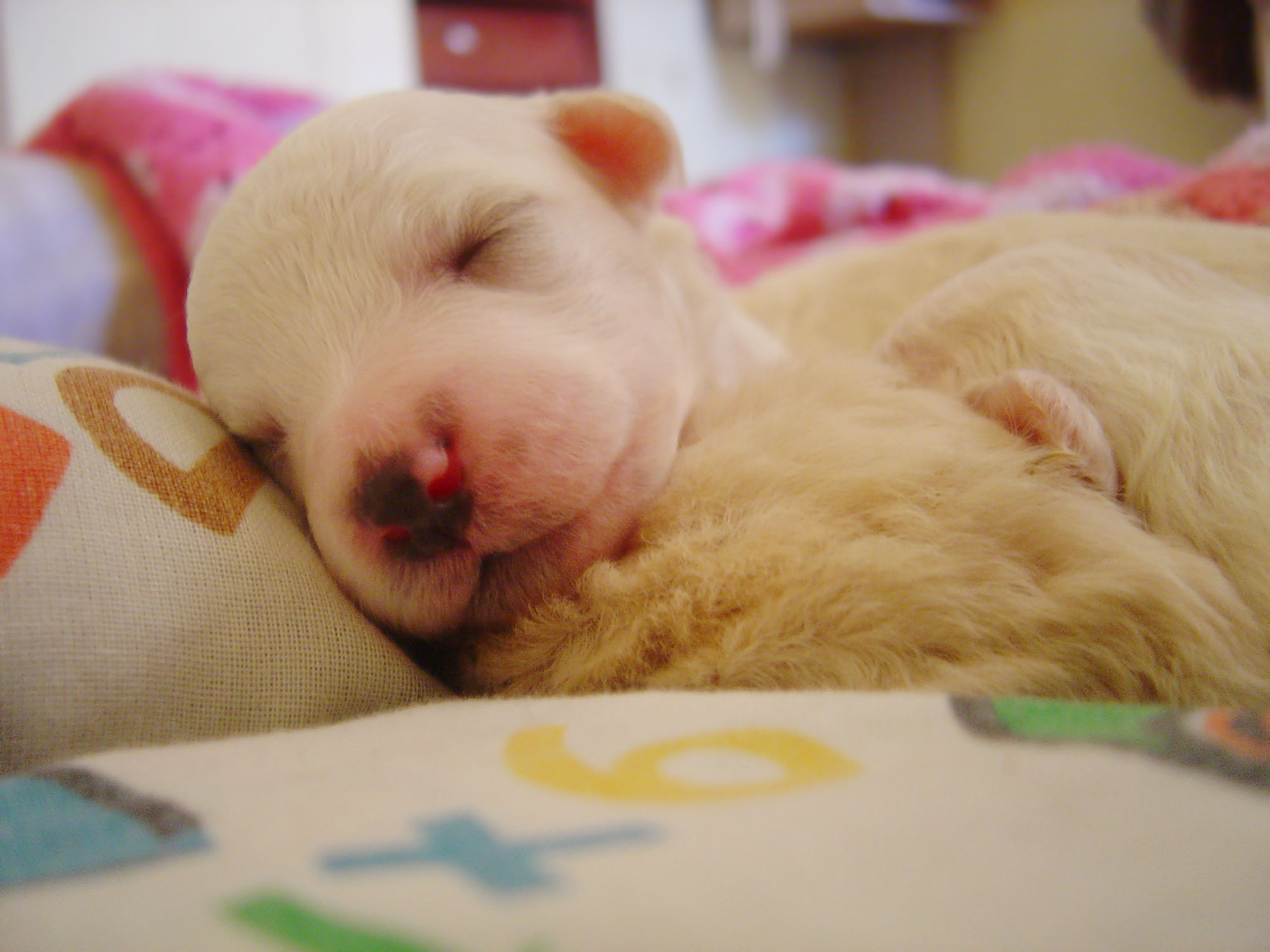 Cachorro de Caniche